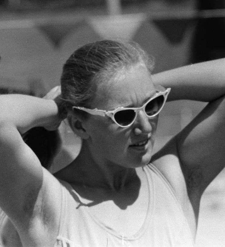 Lorraine Crapp, 1960 Olympics